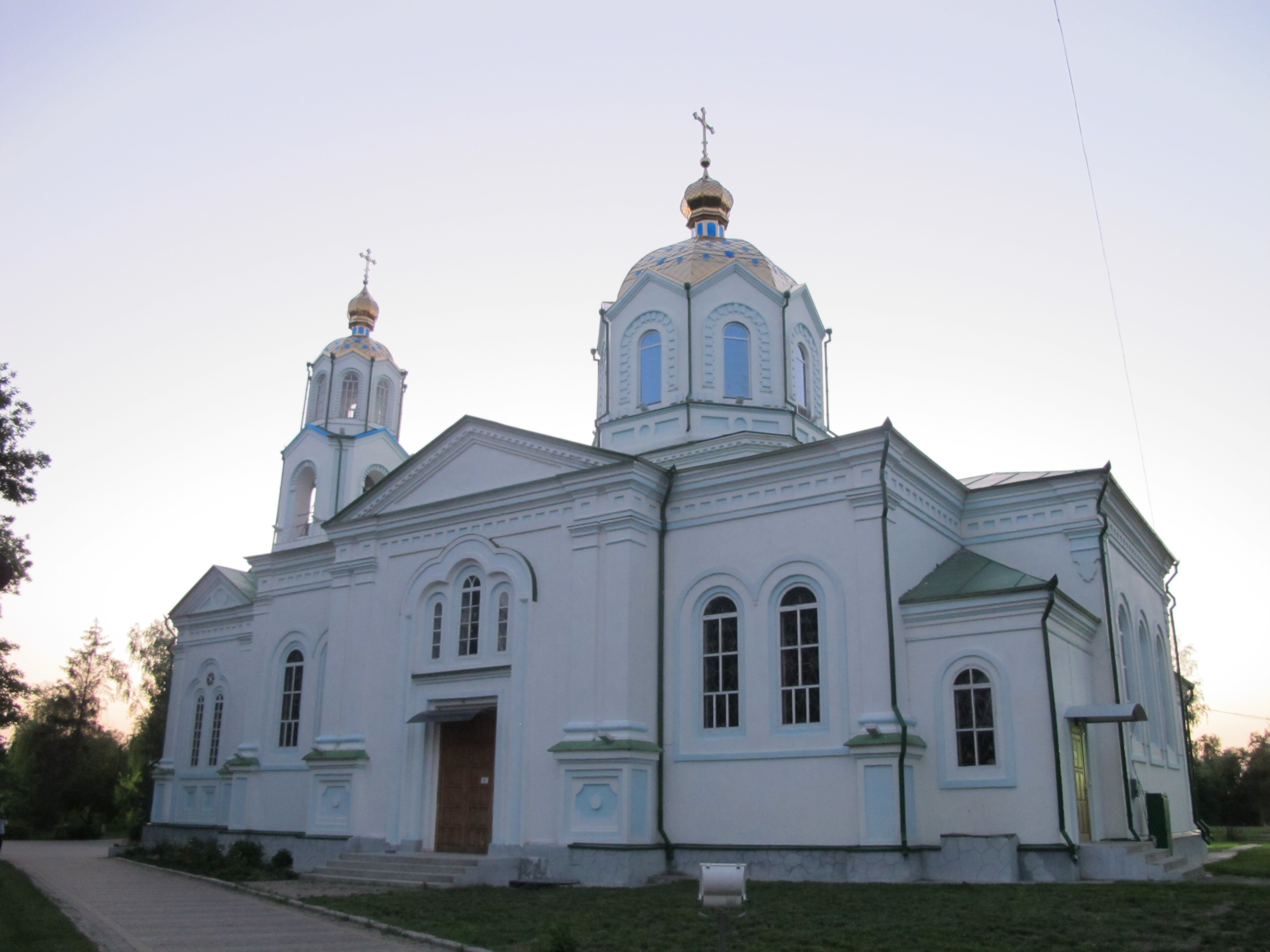 Успенський собор (Миргород), Українська Православн Церква (Московського Патріархату)